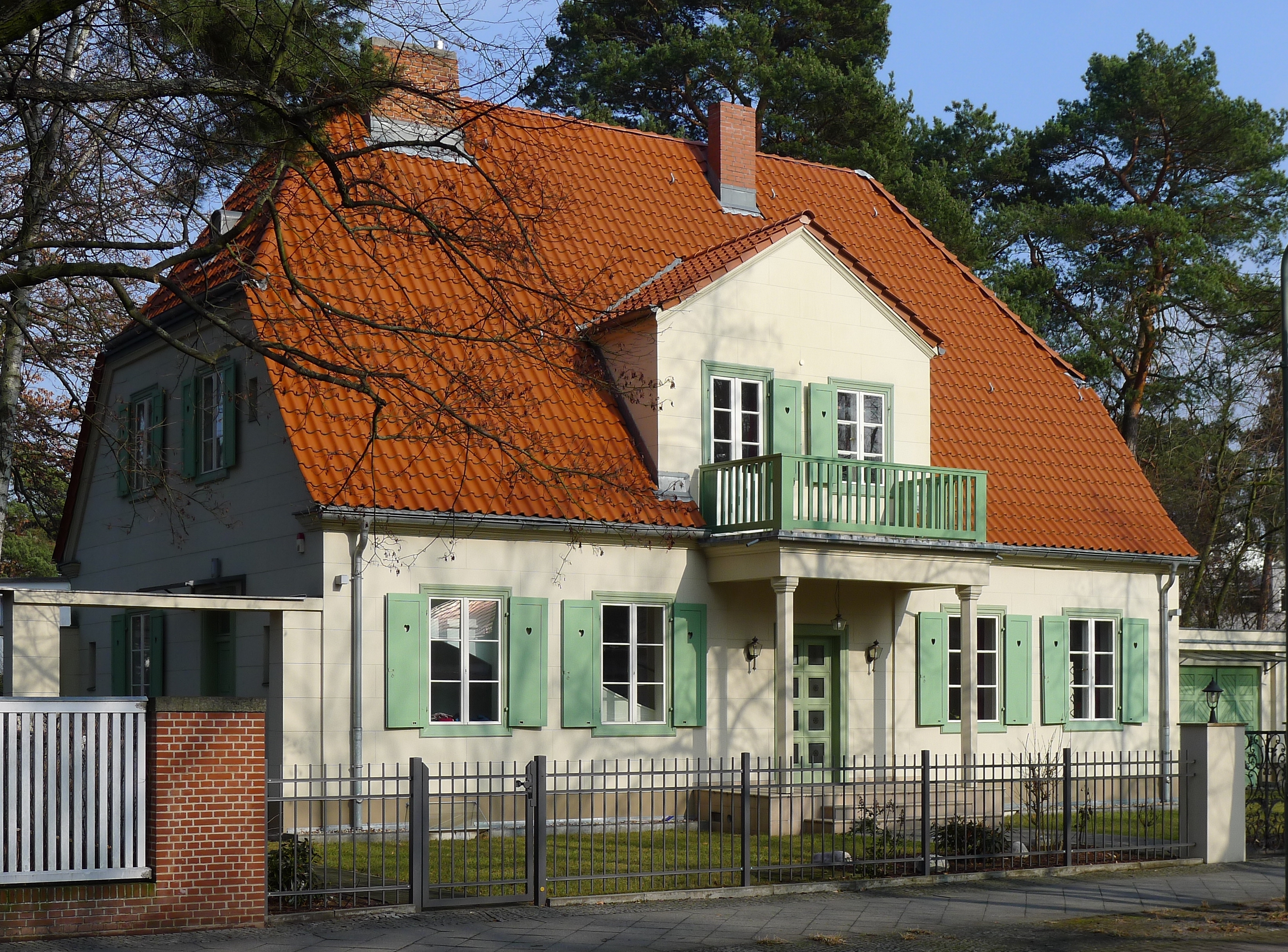 Wohnhaus für den Bildhauer Carl Ebbinghaus in Berlin-Schmargendorf, Rheinbabenallee 44; erbaut 1921 durch die Berliner Architekten Alfred Breslauer und Paul Salinger; unter Denkmalschutz